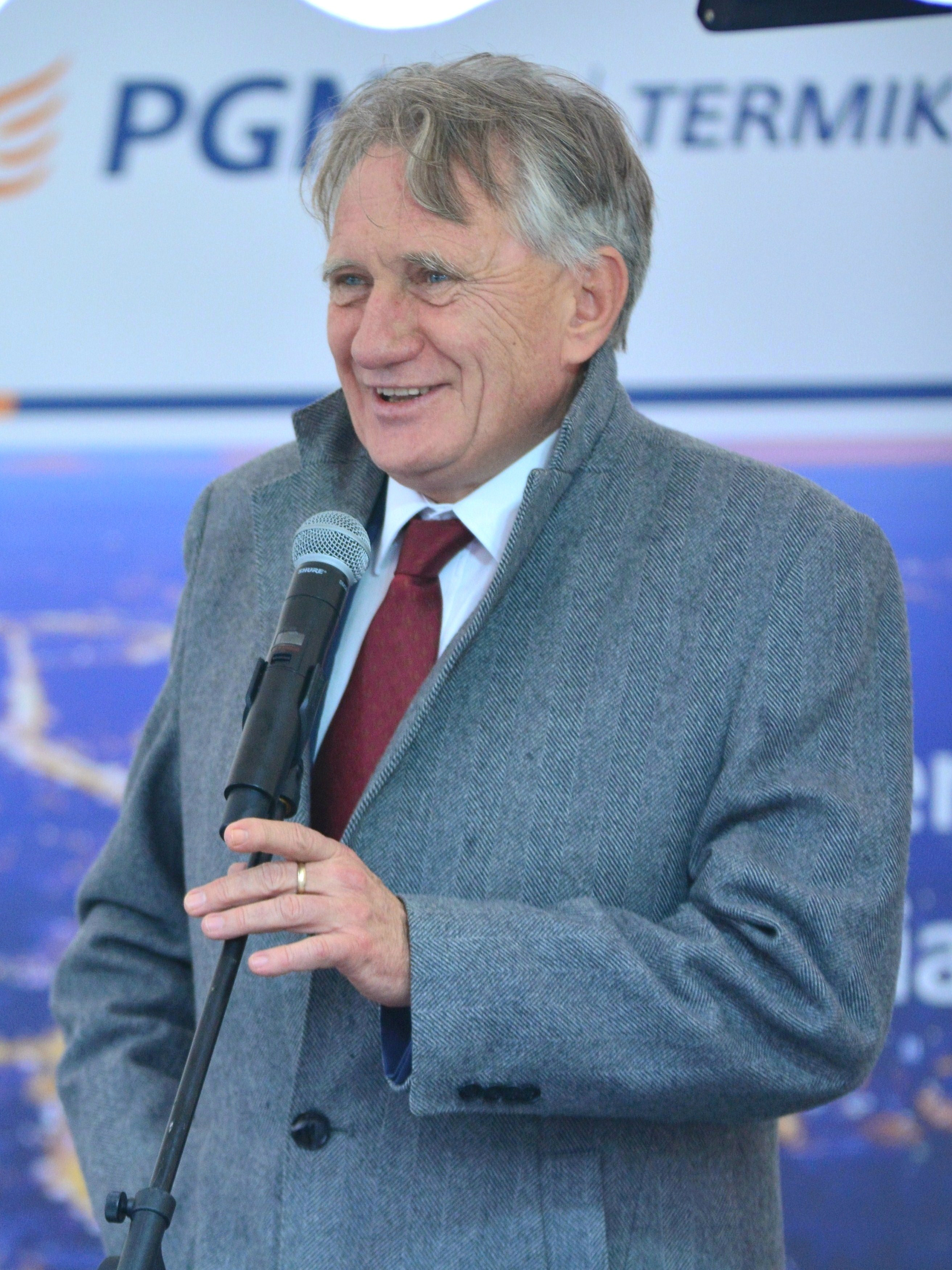 Piotr Woźniak, geolog, urzędnik, prezes zarządu PGNiG.